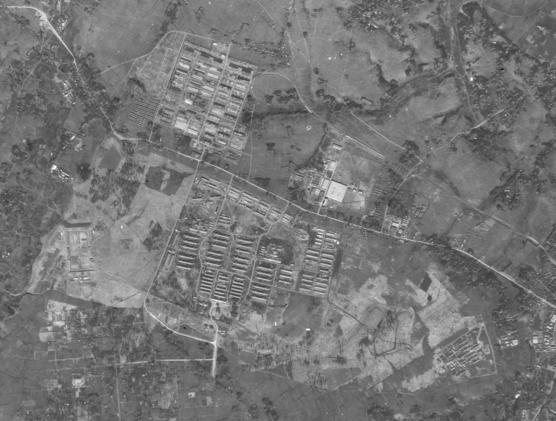 1946年 朝霞市空撮写真